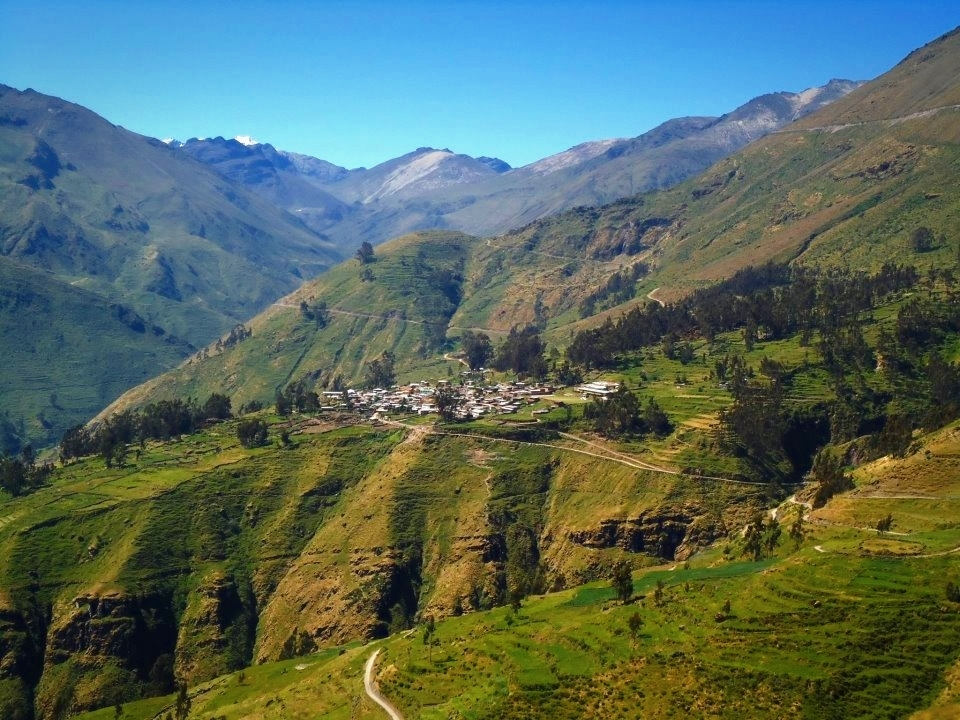 Vista lateral del Distrito de Ayavirí, ubicado a +- 3250 msnm en la zona nor oeste de la Provincia de Yauyos. Fotografía tomada desde el lugar llamado Oguisca. Ayavirí se crea como Distrito el 4 de agosto de 1821. Limita con los Distritos de Quinches, Tanta, Miraflores, Carania, Yauyos, Huampará, Allauca y Omas (Tamará).